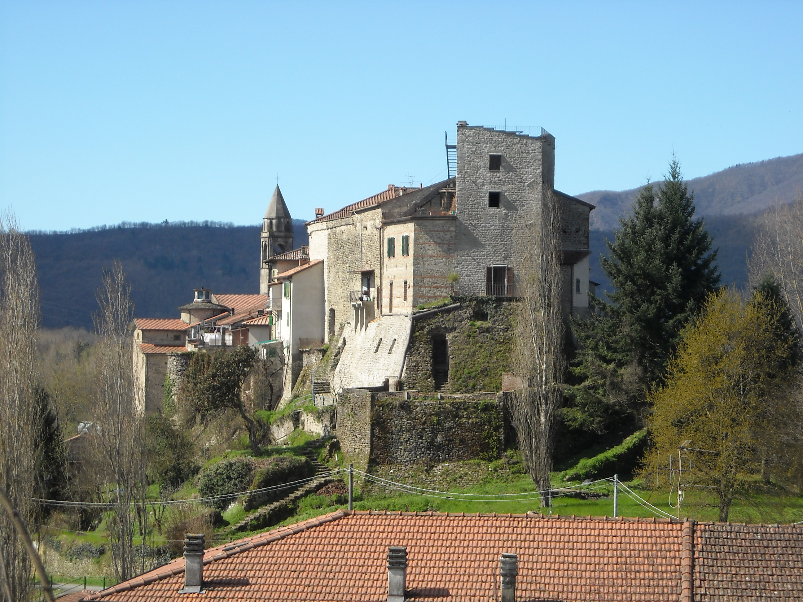 Autore: Simone Agnetti